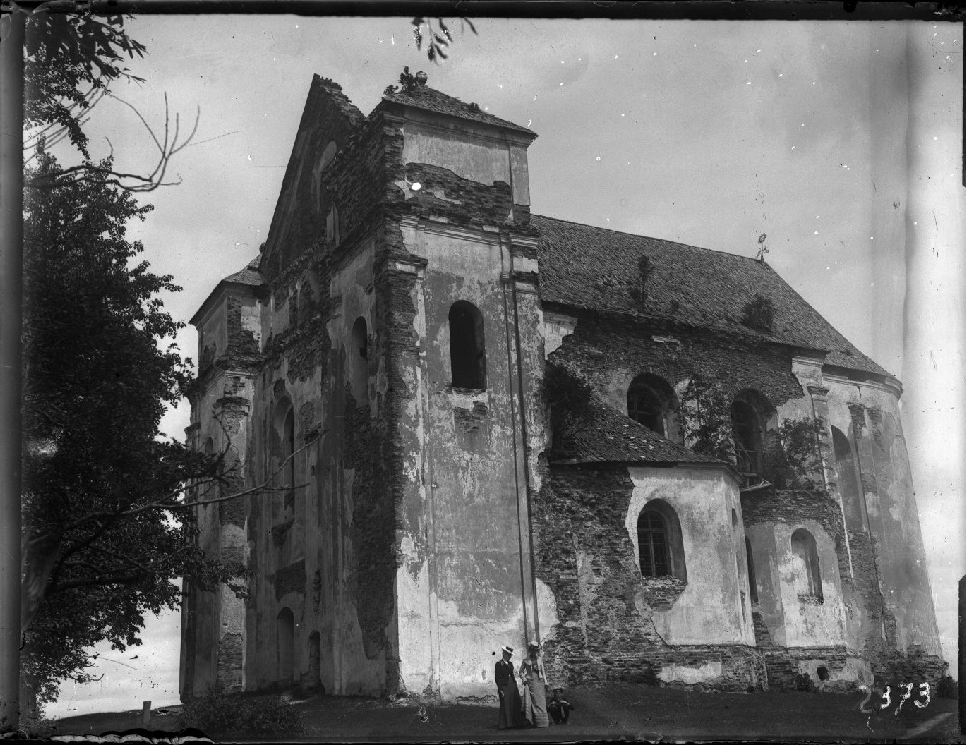 Беларуская (тарашкевіца): Наваградак (Navahradak). Фарны касьцёл (Fara)